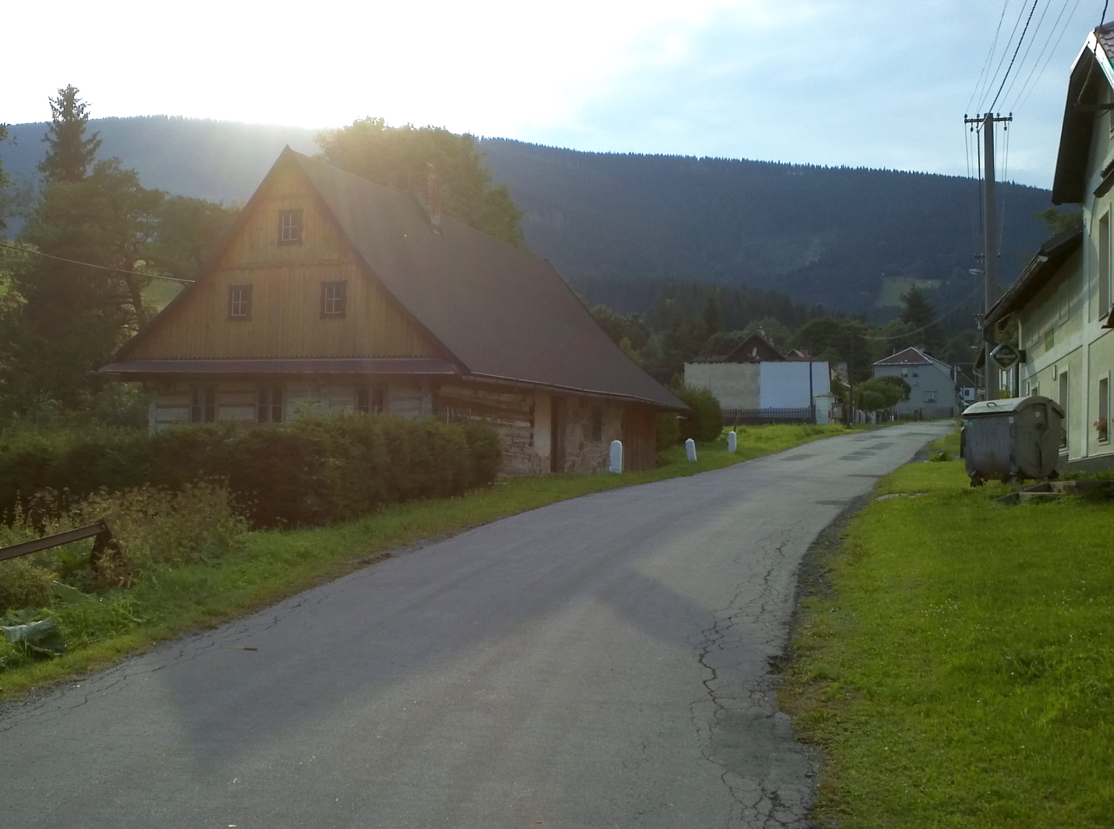 Stříbrnice - hlavní ulice.